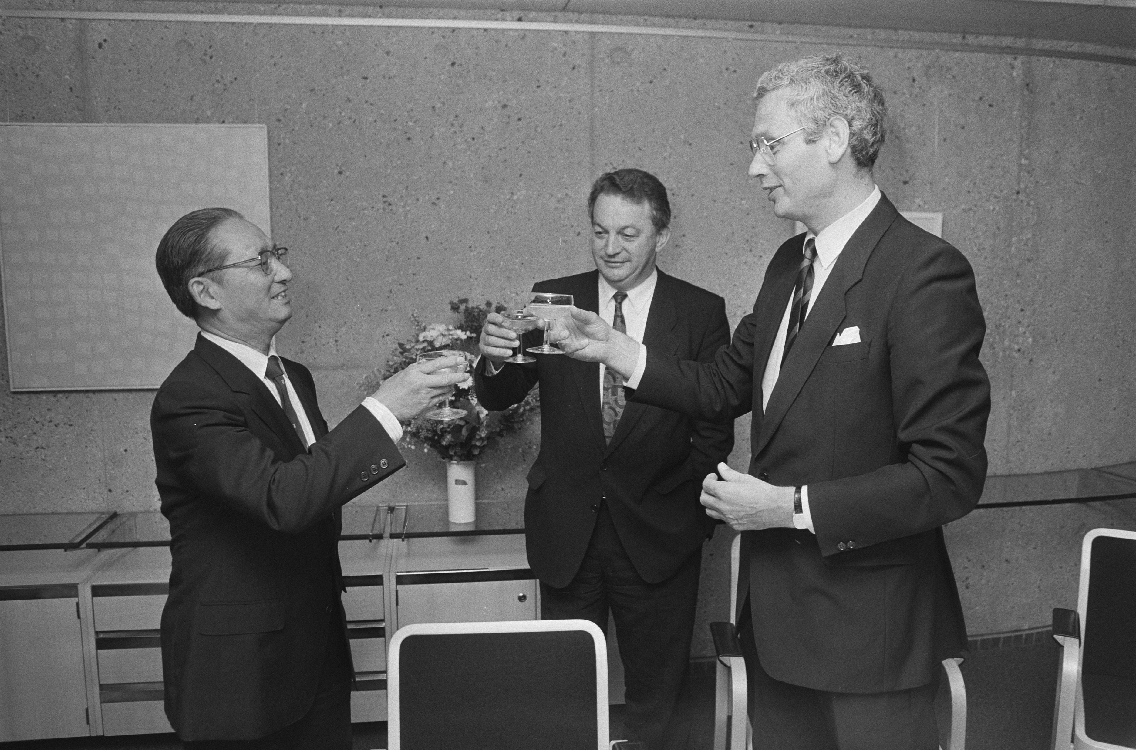 Collectie / Archief : Fotocollectie Anefo Reportage / Serie : [ onbekend ] Beschrijving : Bezoek Chinese minister van Landbouw, veehouderij en visserij He Kang (r) aan ons land; toost ministers He Kang (l), Braks (m) en van den Broek (r) Datum : 25 augustus 1986 Trefwoorden : bezoeken, ministers, toosten Persoonsnaam : Braks, Gerrit, Broek, Hans van den, He Kang Fotograaf : Molendijk, Bart / Anefo, [onbekend] Auteursrechthebbende : Nationaal Archief Materiaalsoort : Negatief (zwart/wit) Nummer archiefinventaris : bekijk toegang 2.24.01.05 Bestanddeelnummer : 933-7381